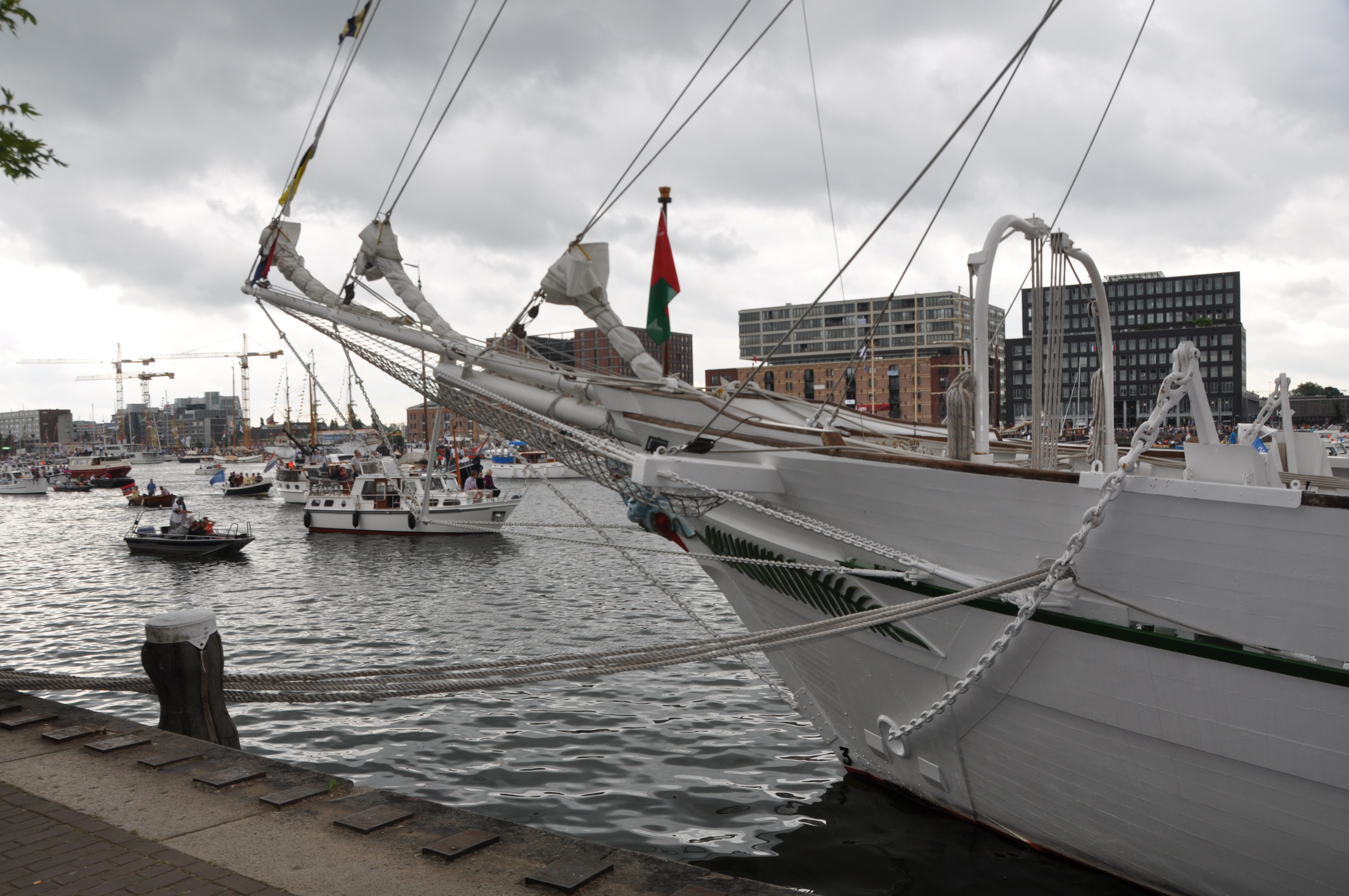 De SHABAB OMAN voor de wal bij Sail Amsterdam 2010.